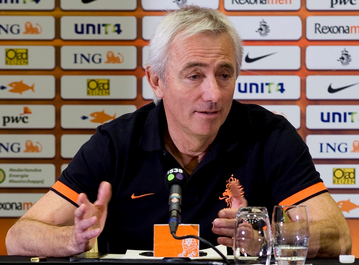 Bert van Marwijk am 6. April 2012.